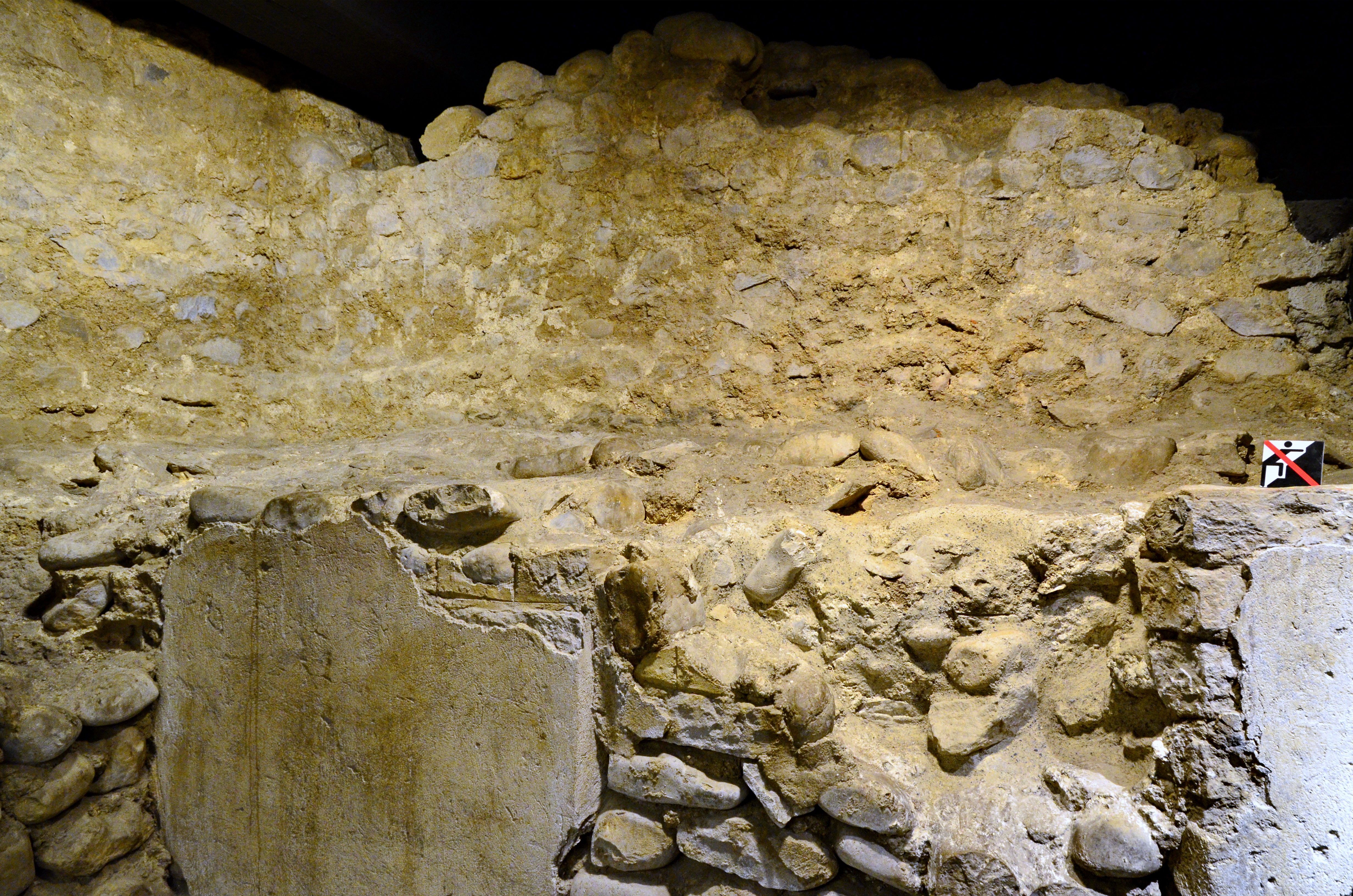 Lindenhof-Keller, Turicum (Zürich) : Römisches Gebäude: Keller eines Hauses (2./3.Jh.n.Chr.) der kleinen römischen Siedlung Turicum. Die Kelelrwand mit nachträglich zugemauertem Fenst (?) und gut erhaltenem Verputz. Die Querwand links ohne Verputz ist jünger. Im Hintergrund die Mauern des spätrömischen Kastells (gemäss Beschriftung).